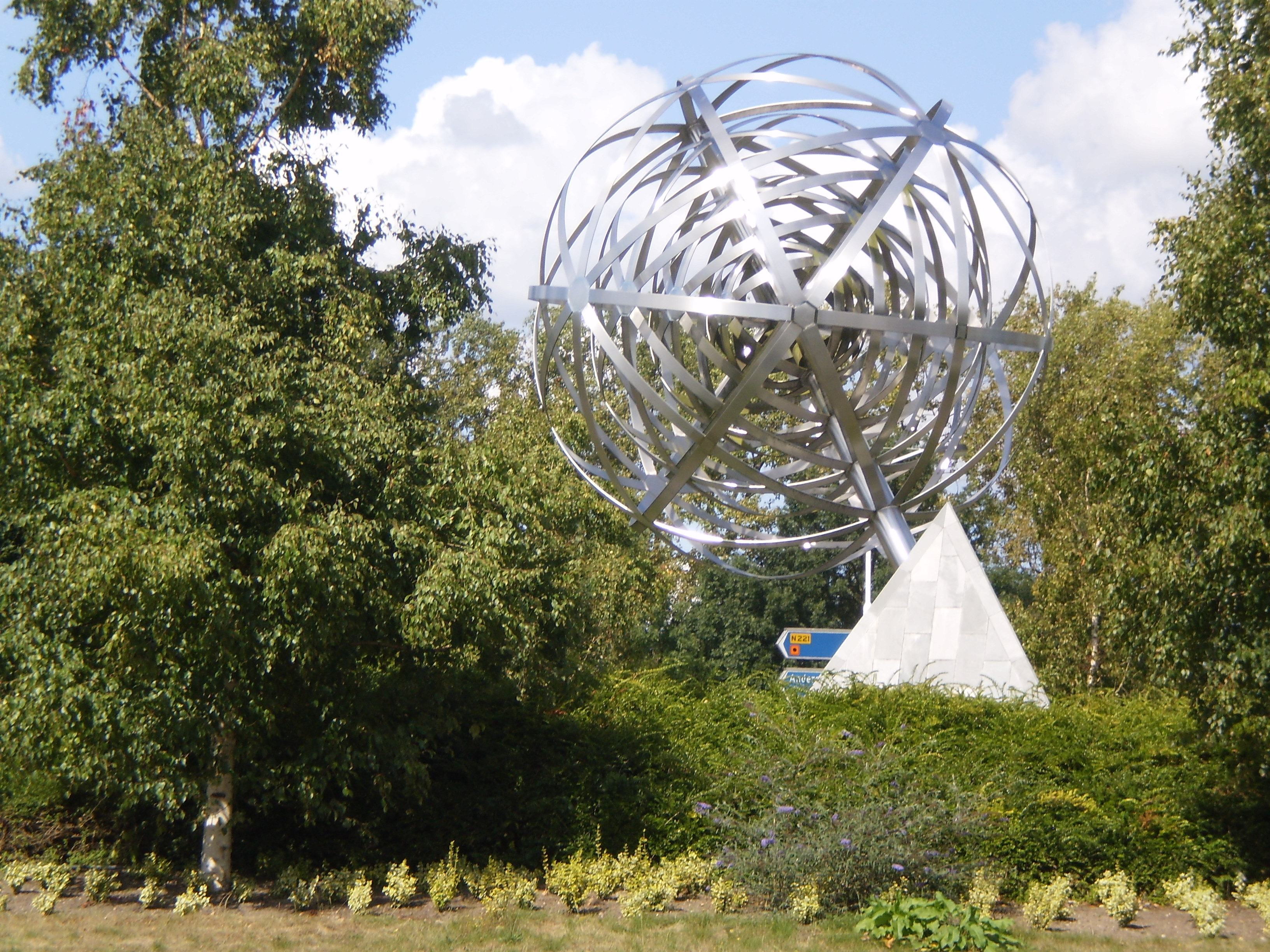 Westkant Escher rotonde.